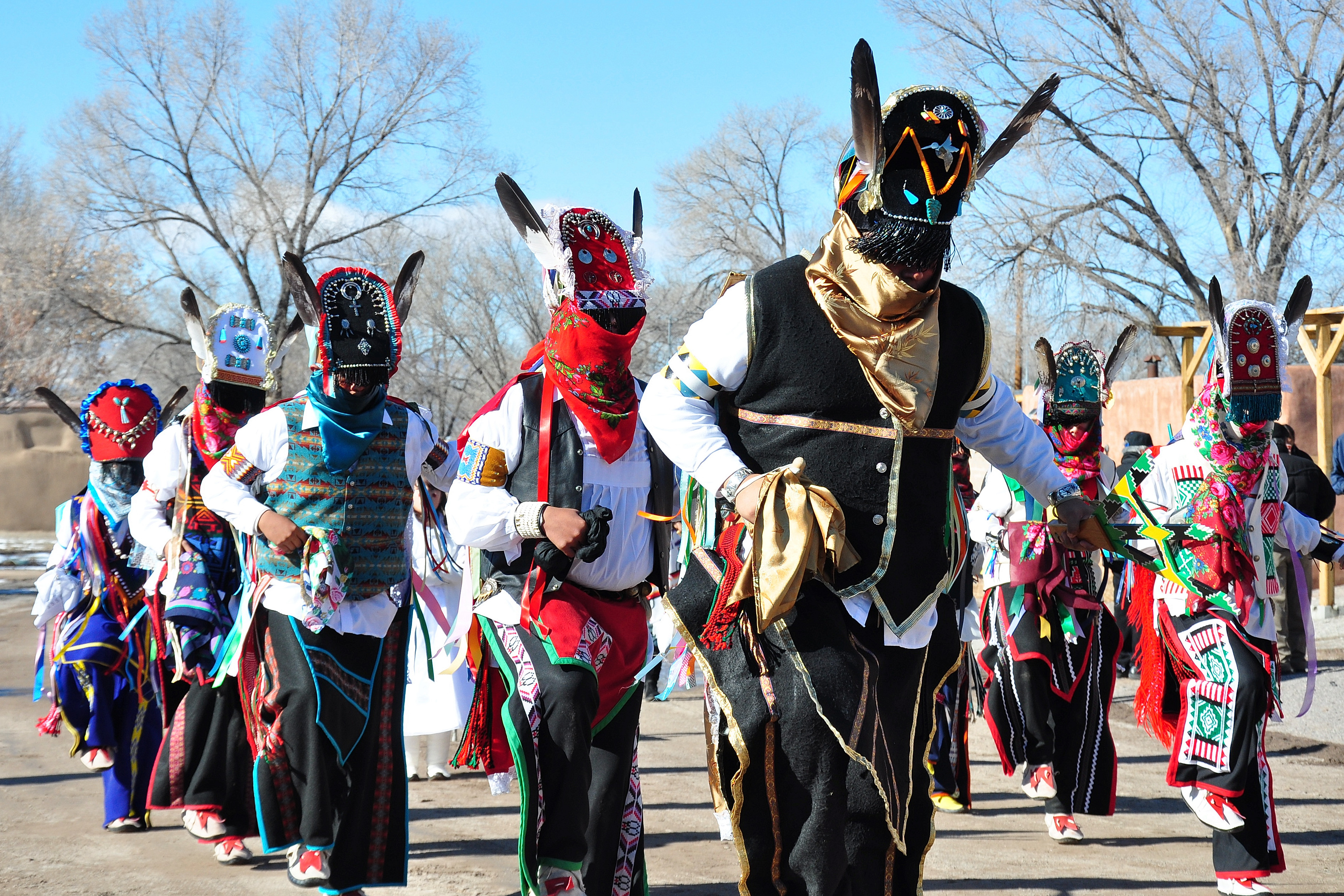 Ohkay Owingeh Pueblo - Xmas Day